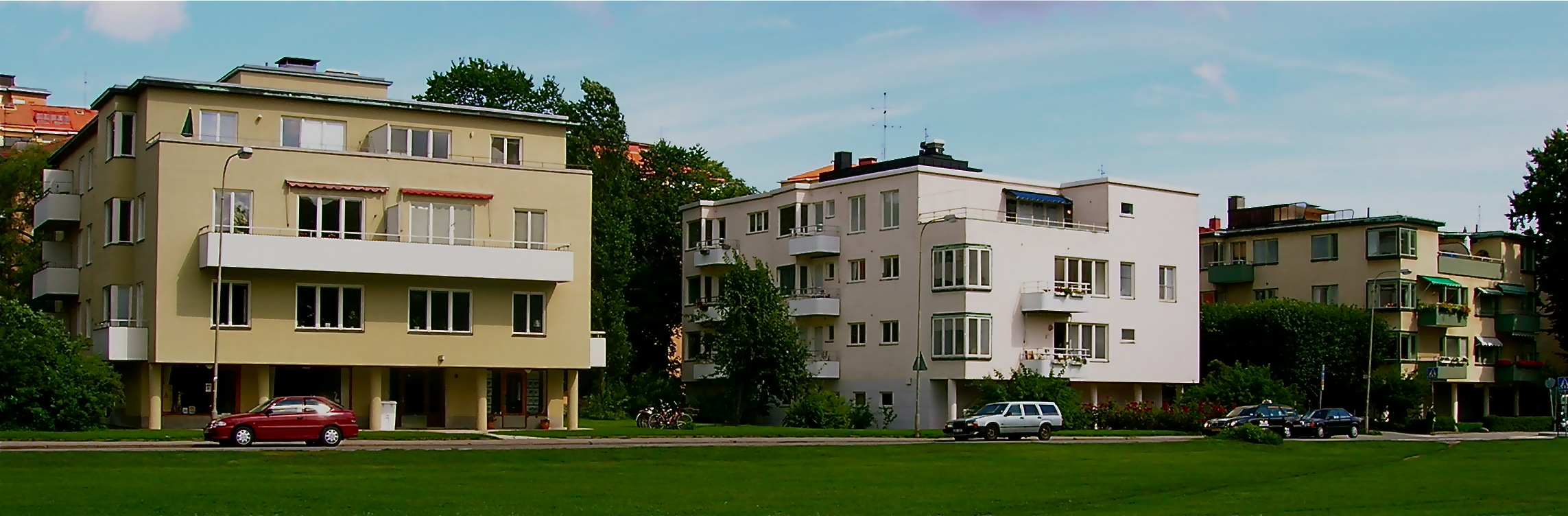 Askrikegatan 11-15, Ladugårdsgärdet, Stockholm .Husen uppförda 1937.